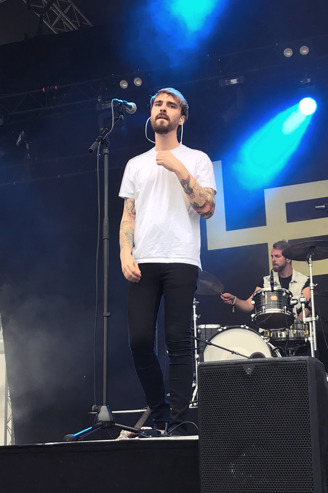 Leo Stillman esiintymässä Kotka Soi -tapahtumassa 14. kesäkuuta 2019